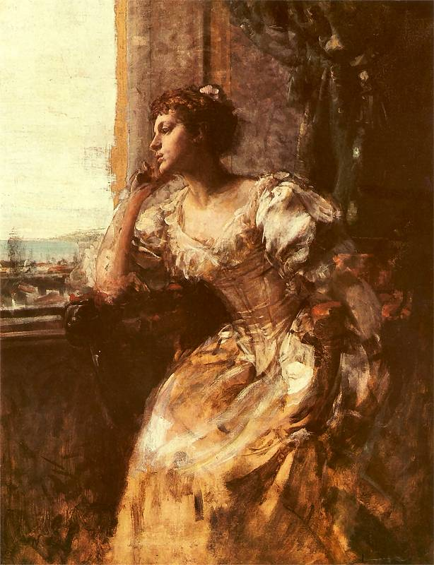 Władysław Czachórski (1794 – 1911), Polish painter.